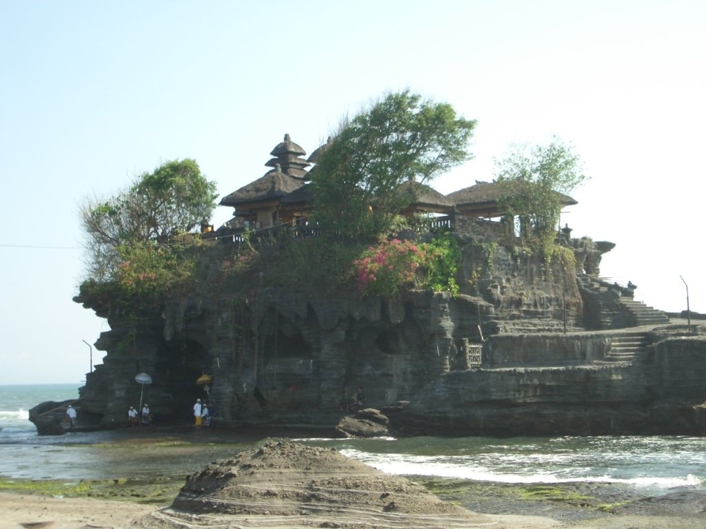 Pura Tanah Lot - auf deutsch häufig "Meerestempel" genannt - ist ein Tempel an der Küste im Südwesten der indonesischen Insel Bali.